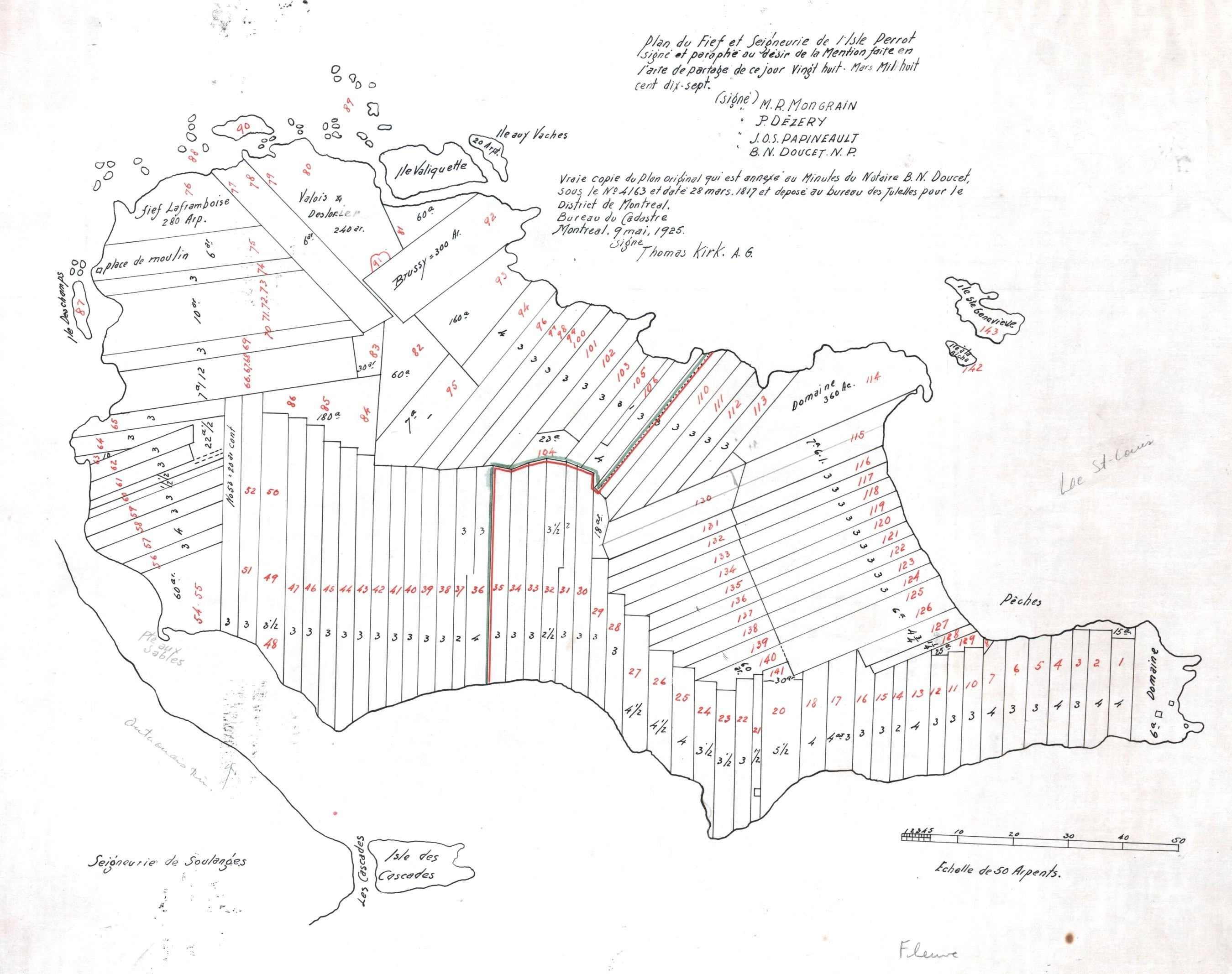 Plan du fief et seigneurie de l'Isle Perrot signé et parafé au désir de la mention faite l'acte de partage de ce jour vingt-huit mars mil huit cent dix sept / Thomas Kirk . - 50 arpents : 1 po . - Copié le 9 mai 1925, original créé le 28 mars 1817 - 1 plan(s) ; 42 x 62 cm Carte de la seigneurie de l'Île-Perrot au moment du partage en 1817. Cette mappe est annexée à l'acte de Doucet du 28 mars 1817. Le lecteur doit remarquer que certaines îles, qui faisaient partie de la seigneurie quand Talon la concéda à Perrot, n'y figurent pas. D'abord l'Ile Saint-Gilles, (aujourd'hui Girwood island), qui se trouve tout près du fief Senneville et qui fut annexée à ce dernier fief (en raison de sa proximité) vers 1705‑6. Les Iles De La Paix également n'apparaissent pas sur la mappe puisque comme nous l'avons vu, elles n'étaient pas inclues dans la vente de la seigneurie par LeMoyne à Desruisseaux en 1703. Les Iles De La Paix furent vendues avec la seigneurie de Châteauguay par les mêmes LeMoyne